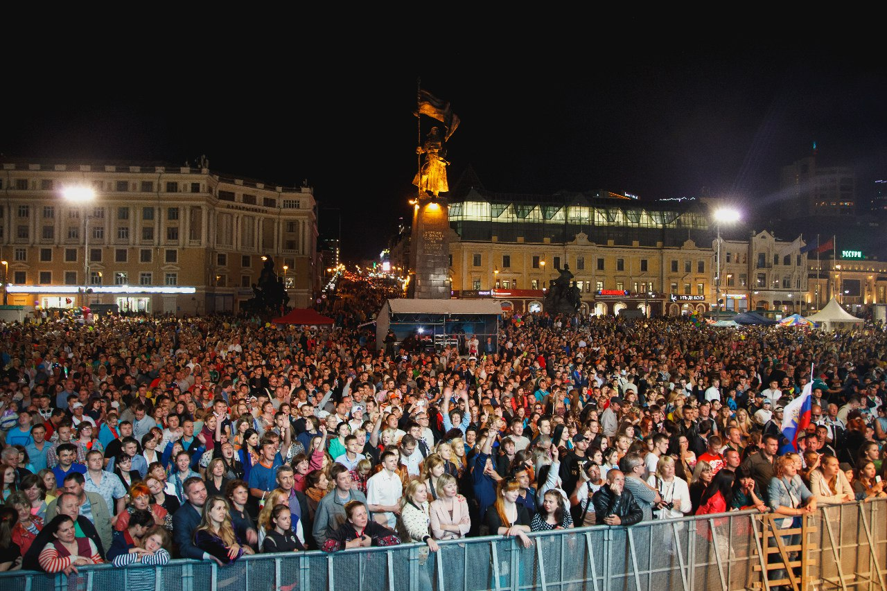 Фестиваль уличного кино во Владивостоке, 2015